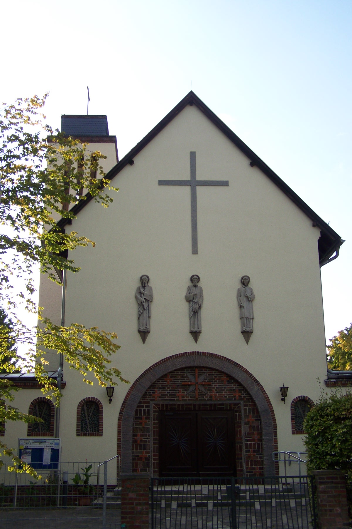 Erkner, katholische Kirche St. Bonifatius (2008-09-24)